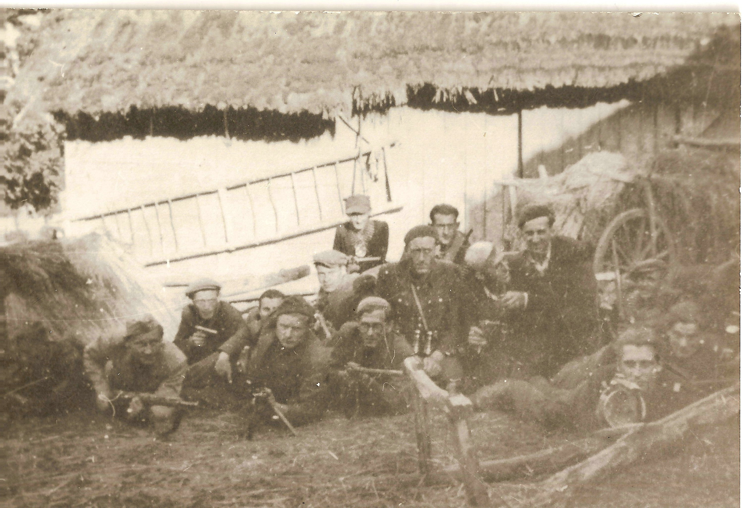 Żołnierze Oddziału Leśnego "Lech"